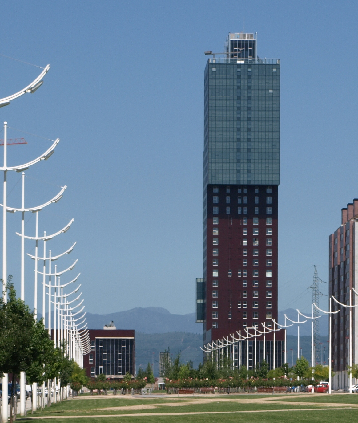 Noves urbanitzacions